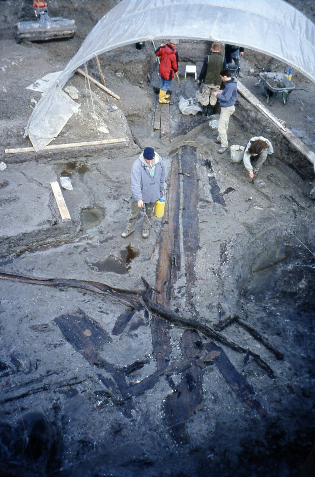 Einbäume von Stralsund, Fundstelle (2002-03-20)